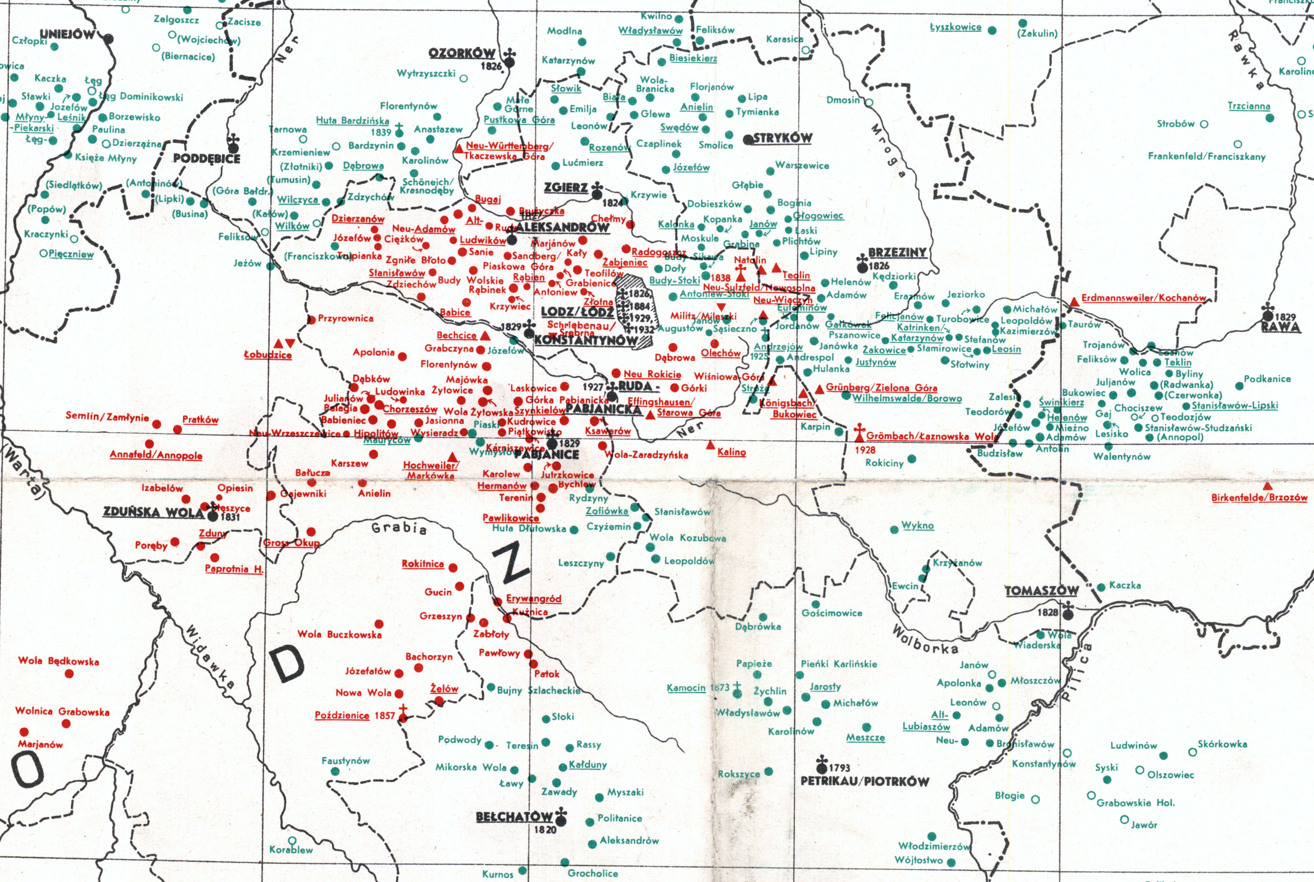 Deutsche Siedlungen in der Region Łódź zwischen den Flüssen Warta (W), Bzura (N) und Pilica (SO), Forschungsstand von 1938. Zeichenerklärung: Grünes Dreieck: Niederunger Grüner Kreis: Pommern Grünes Quadrat: Märker Grünes Kreuz: Mecklenburger Roter Kreis: Schlesier Rotes Dreieck: Südwestdeutsche (auf der Spitze stehend: evangelische, auf der Basis stehend: katholische) Nicht ausgefüllte Figuren: Rest eines deutschen Dorfes Eingeklammerter Ortsname: untergegangenes Dorf Friedhofskreuz fett: evangelische Kirche Friedhofskreuz mager: evangelische Filialkirche Jahreszahl: Gründungsjahr der Kirche